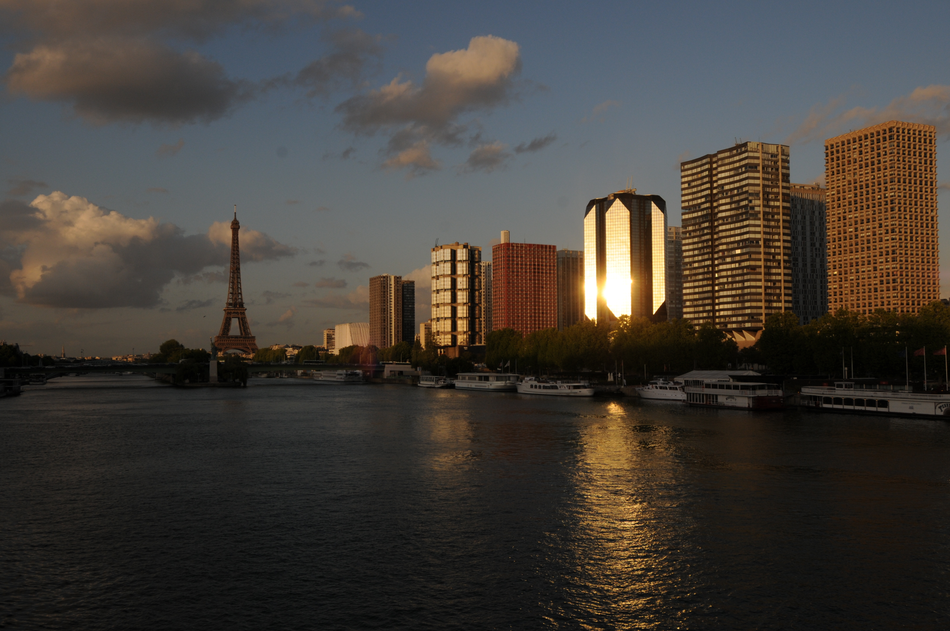 La Tour Eiffel et le Front de Seine à Paris.